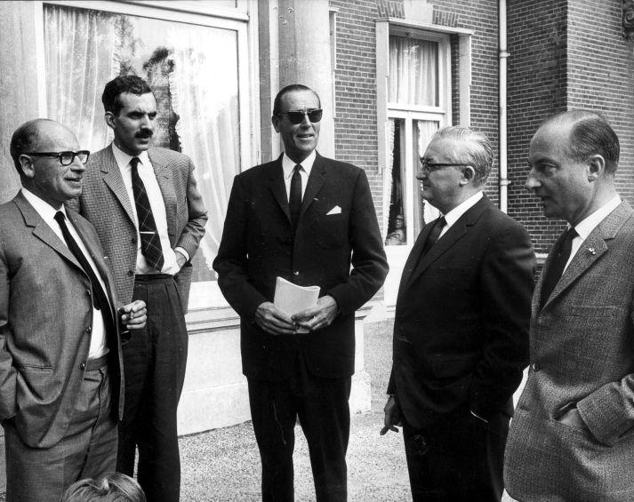 Het KVP Partijbestuur is bijeen in het Romme-instituut in Baarn, 26 augustus 1967, vlnr Van Doorn, Jurgens, Aalberse, De Kort en Schmelzer.